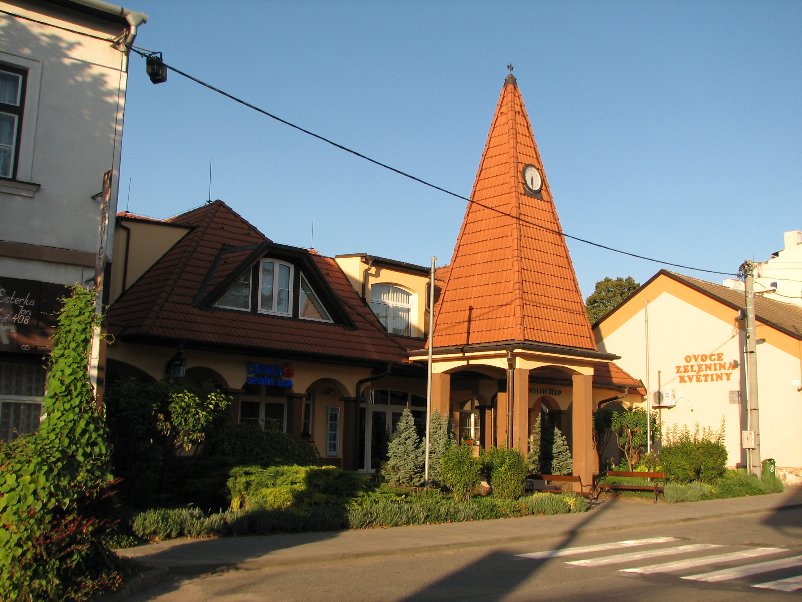 Česky: Čejč - obecní úřad